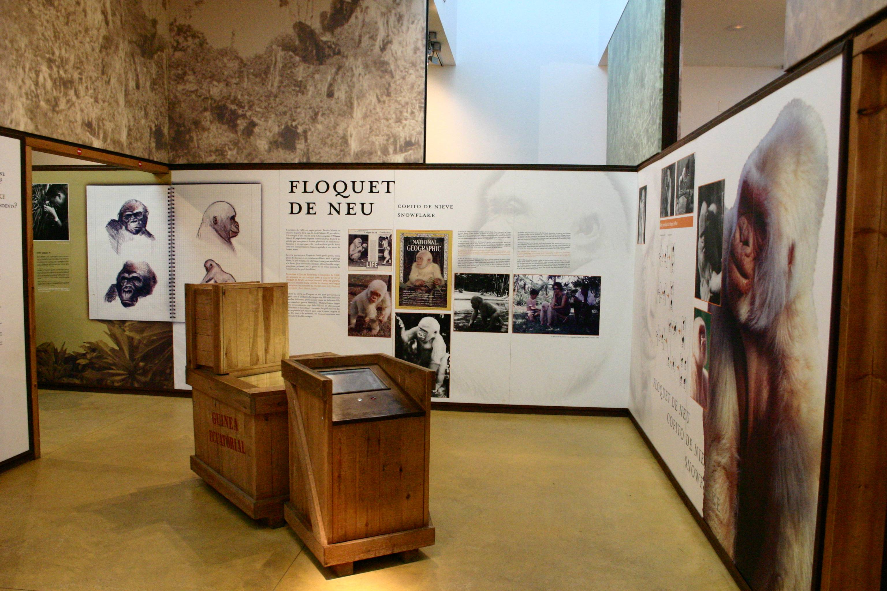 Zoologico de Barcelona. Exposición de Gorilas.